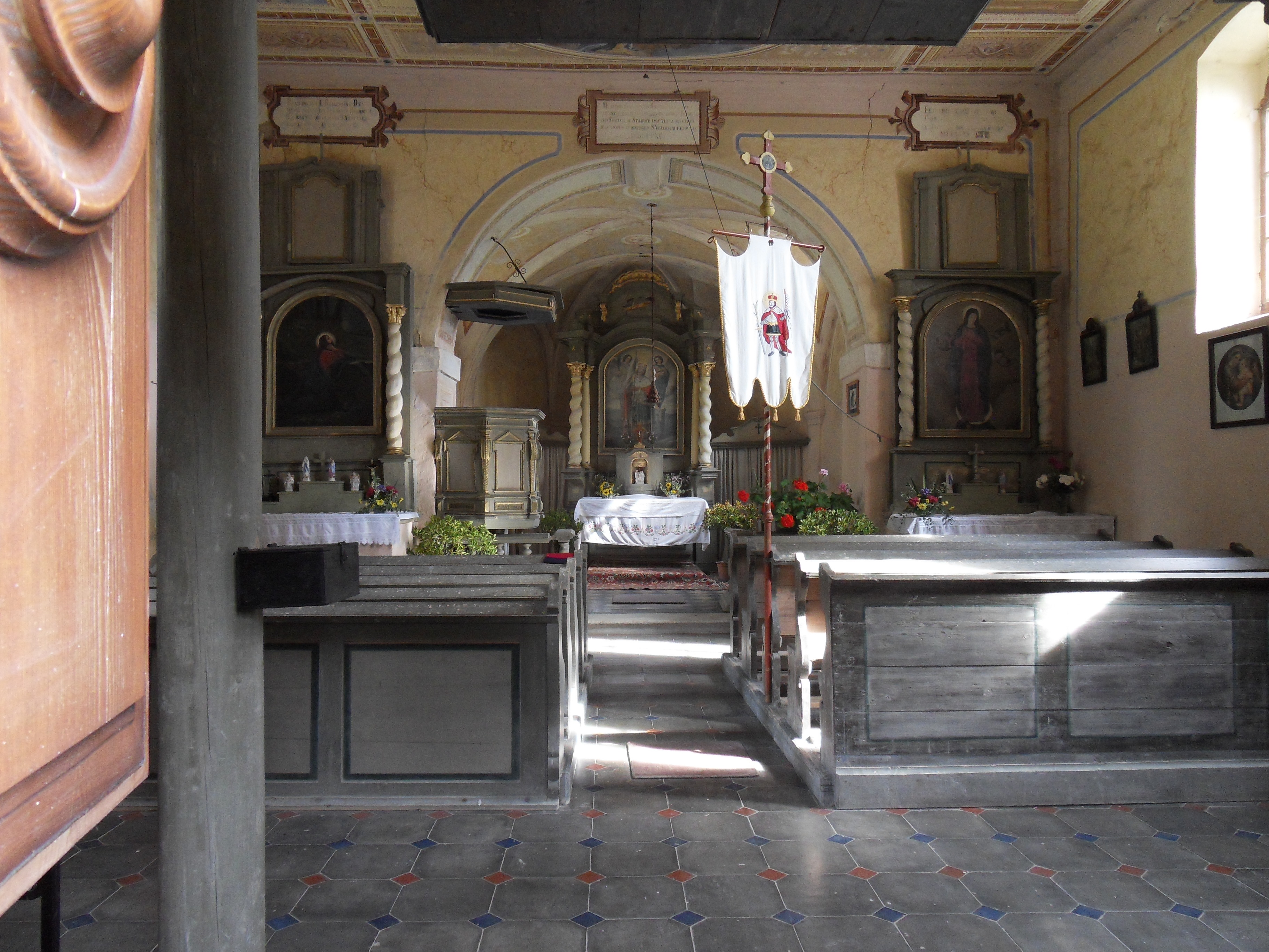 Interiér kaple svatého Václava, na západě vsi poblíž cesty k zaniklé osadě Studánky, Brůdek (Všeruby).